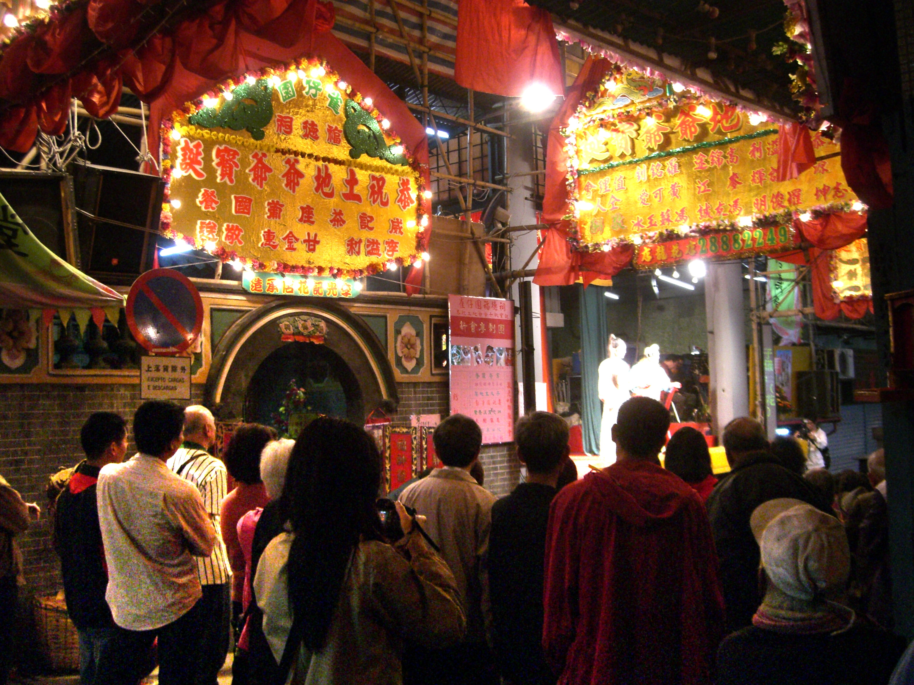 Associação de Beneficência Foc Tac Chi ou Tu Ti Mio de Macau